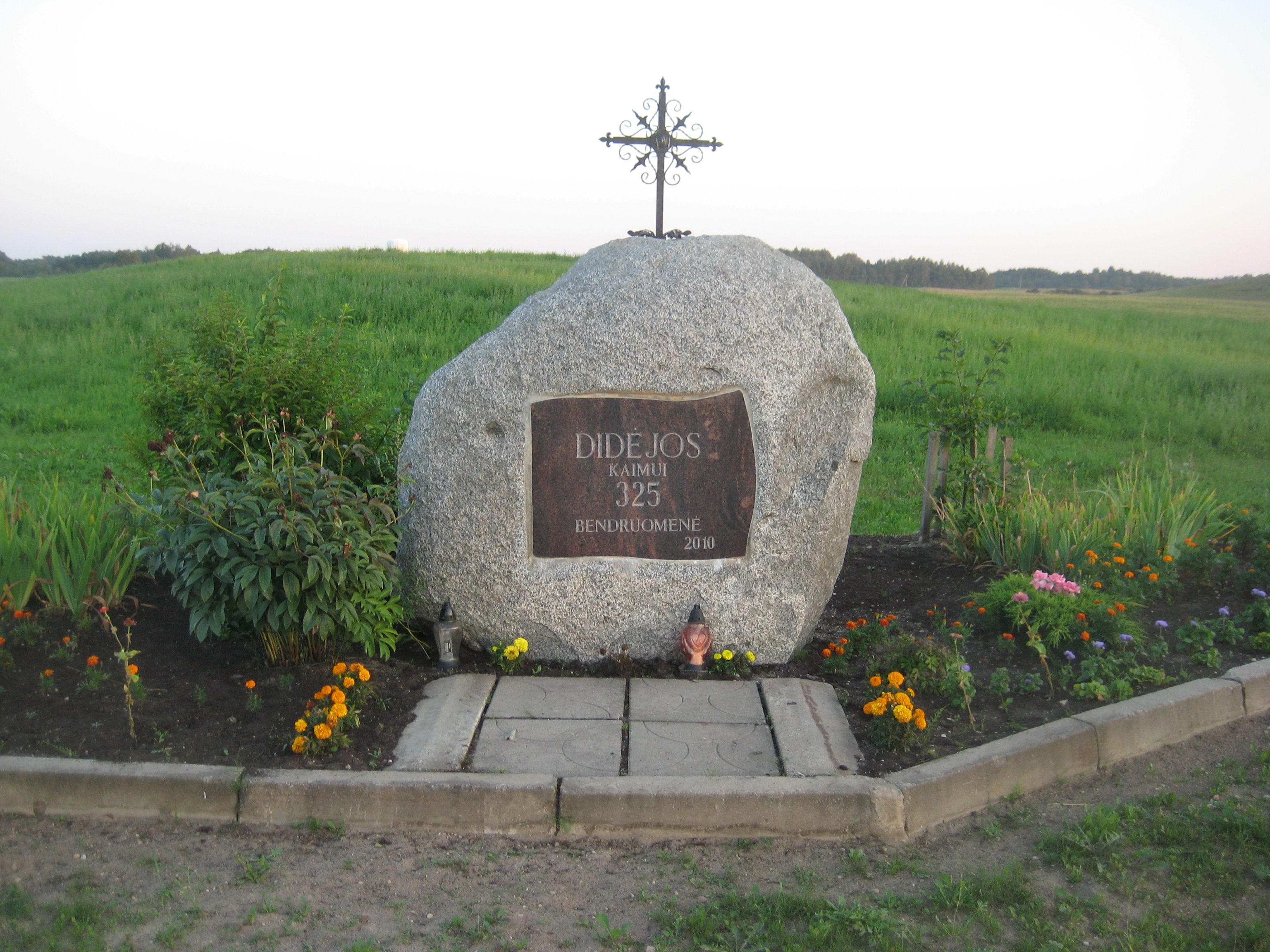 Antazavės sen., Lithuania